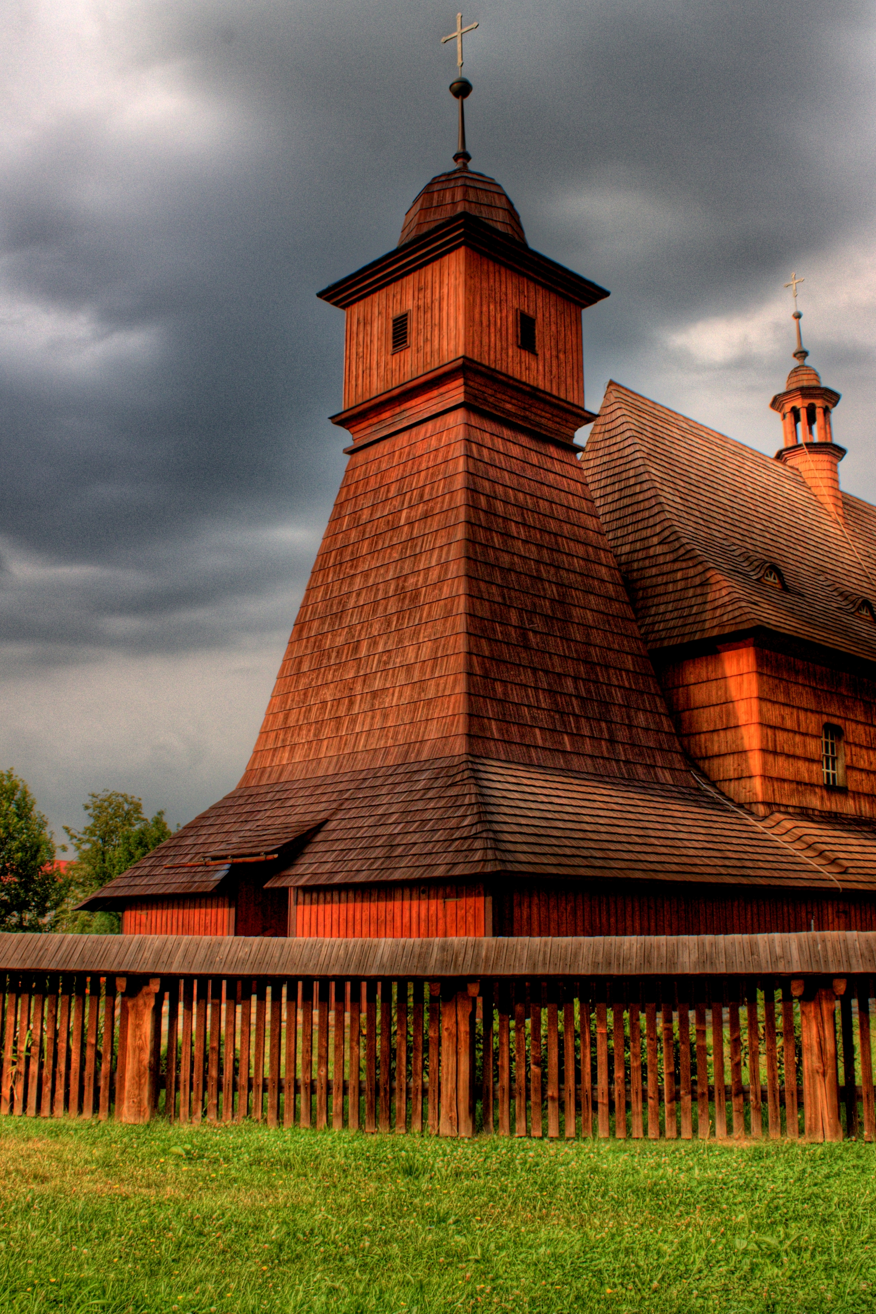 Kostel sv. Kateřiny (Ostrava), Hrabová, Jestřábského, Ostrava